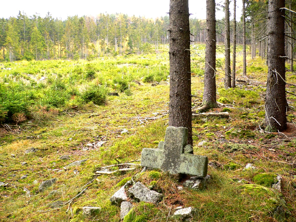 Na památku lesníka V.Gregora ze Záběhlé, zastřeleného v r.1870 pytláky